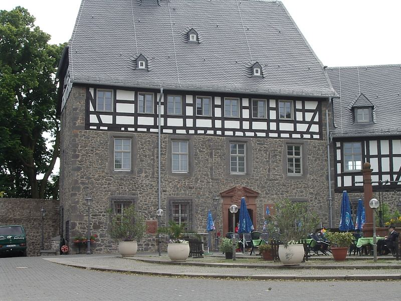 Schiffenberg, Komtureigebäude an der Südseite des ehem. Augustiner-Chorherrenstifts bzw. des Ordensklosters, Nordansicht, von N (ca. 2004-05-31). Im Kern spätgotisch, Portal barock.